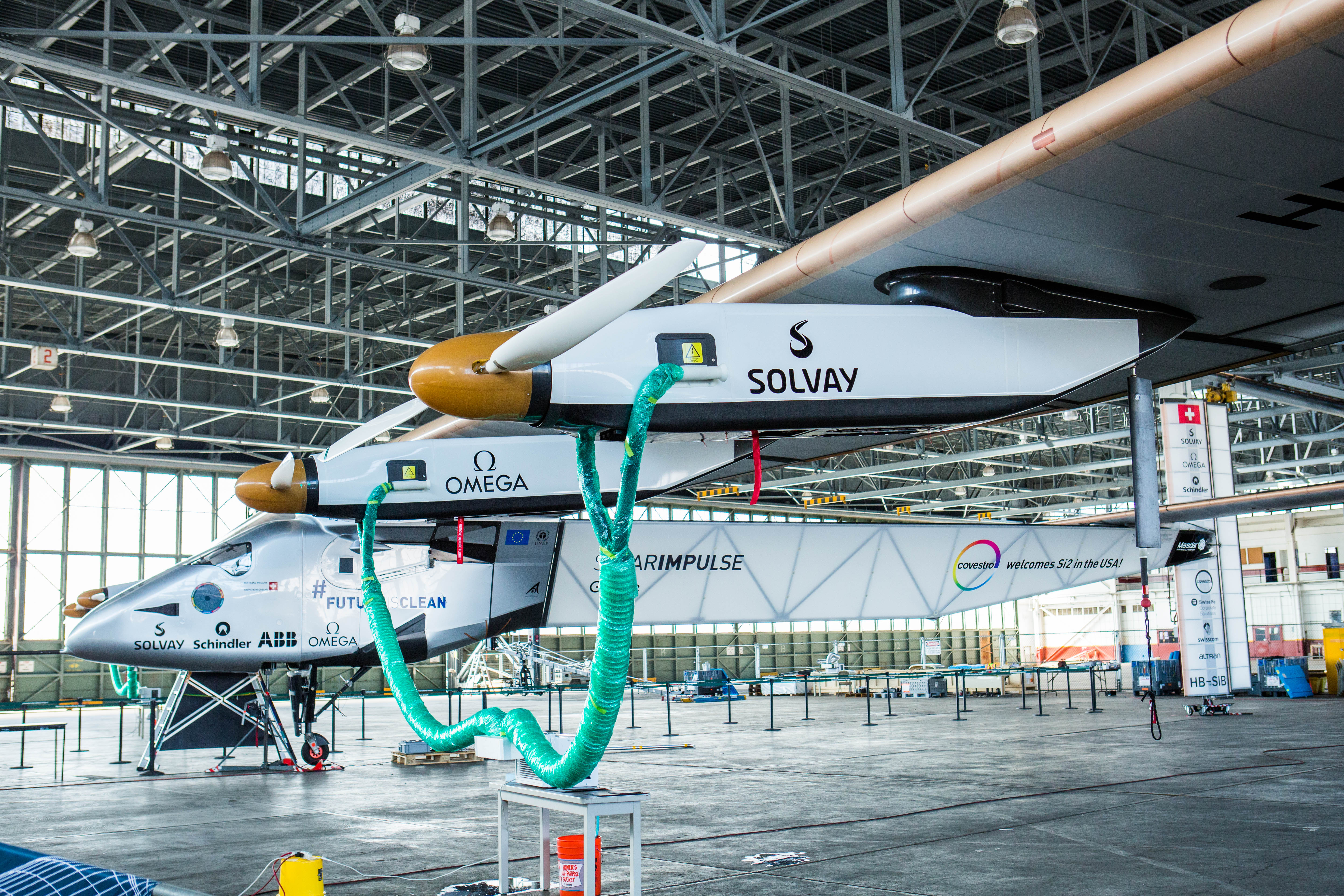 HB-SIB während des Aufenthalts auf Hawaii. Grüne Luftschläuche zur Temperierung der Akkus.